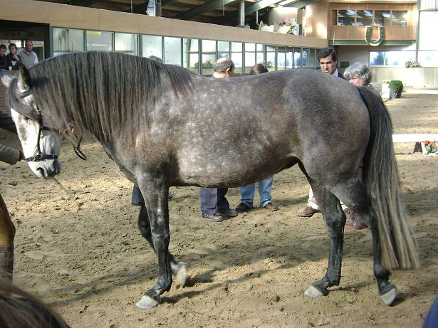 Lusitano